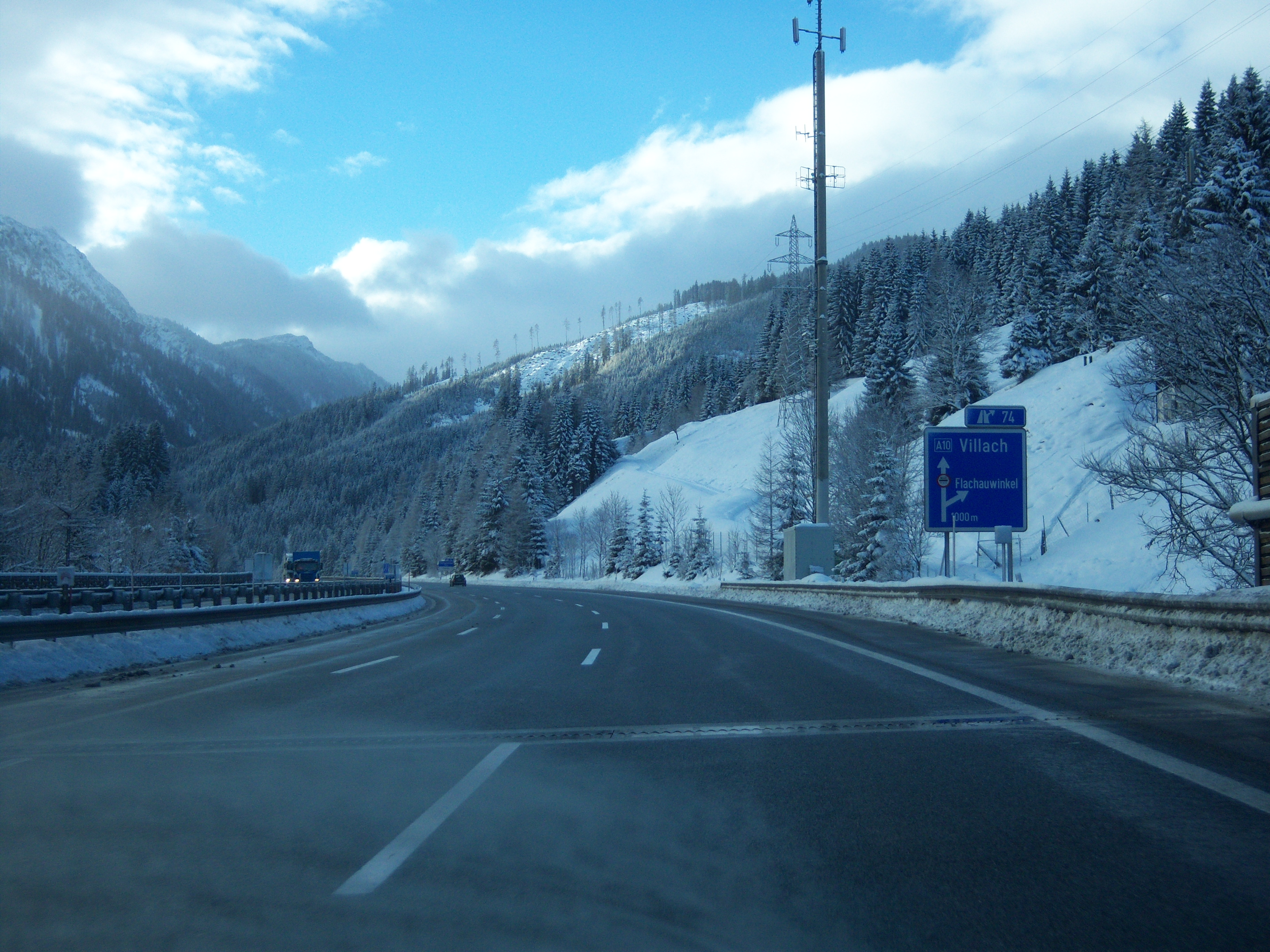 Tauern Autobahn A10 Richtung Villach im Bereich der Anschlussstelle Flachauwinkel